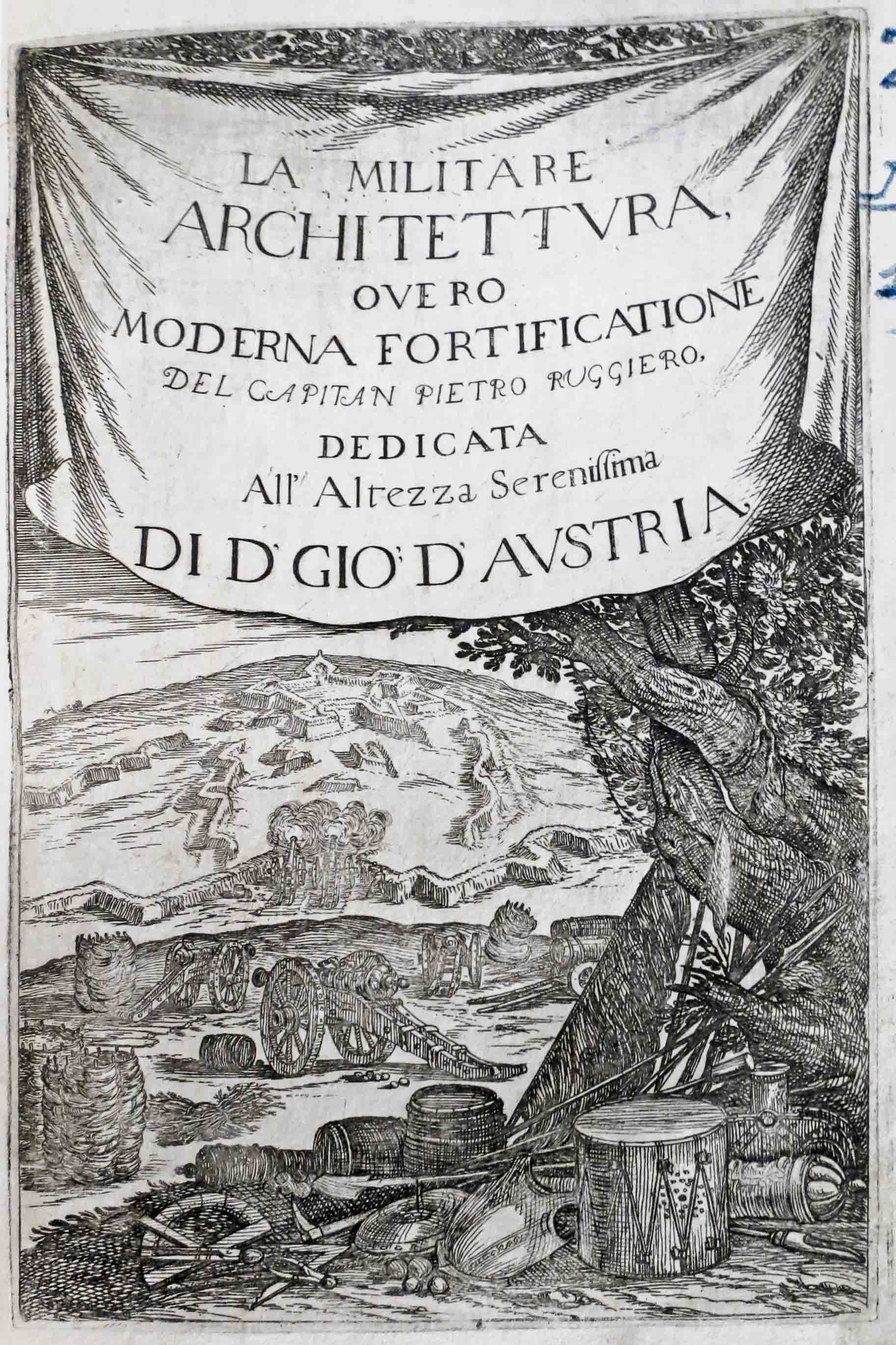 La militare architettura, overo moderna fortificatione del capitan Pietro Ruggiero, dedicata all'Altezza Serenissima di D. Gio[vanni] di Austria. Milano, appresso Lodovico Monza, 1661.